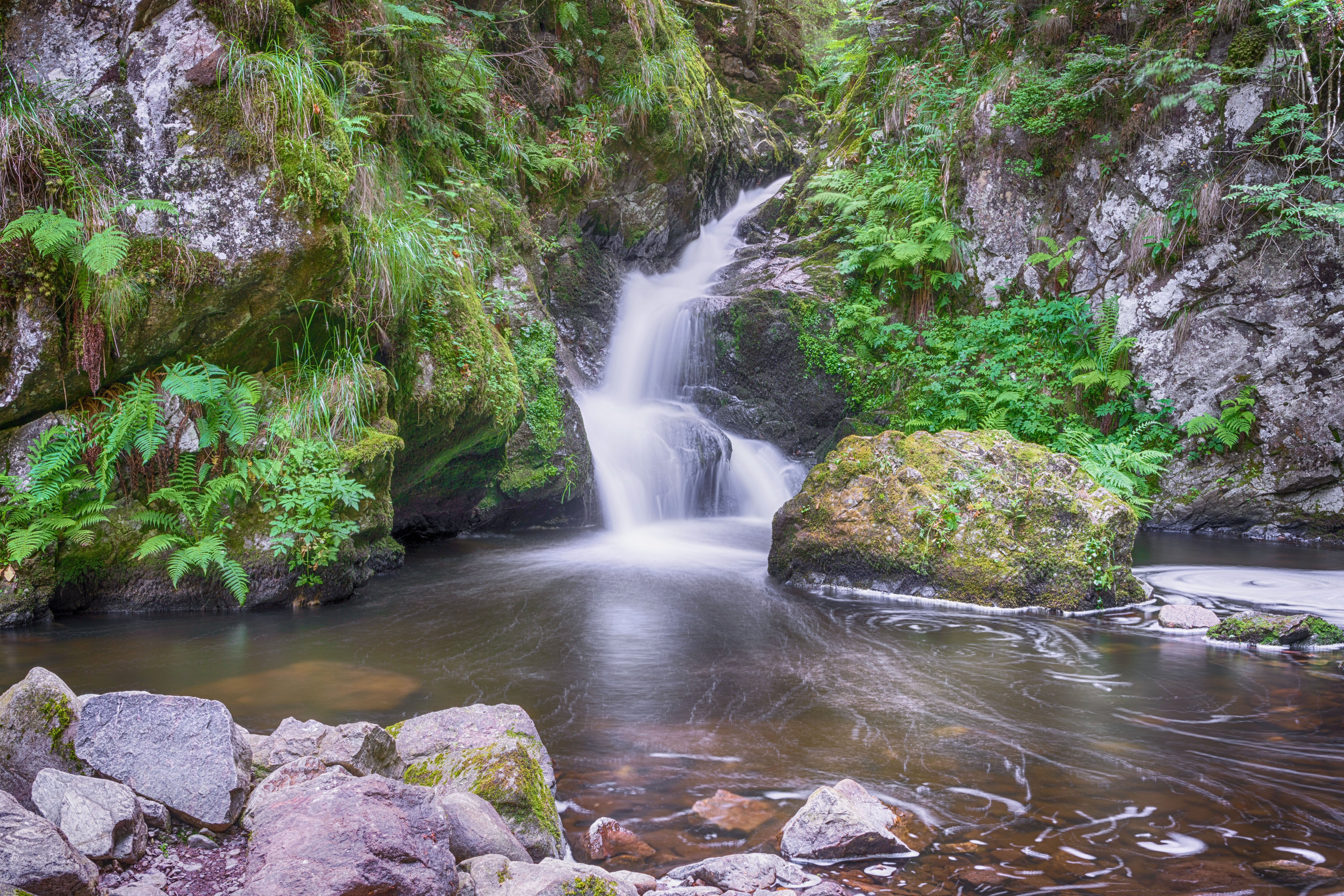 kleiner Ravenna Wasserfall in der Ravennaschlucht